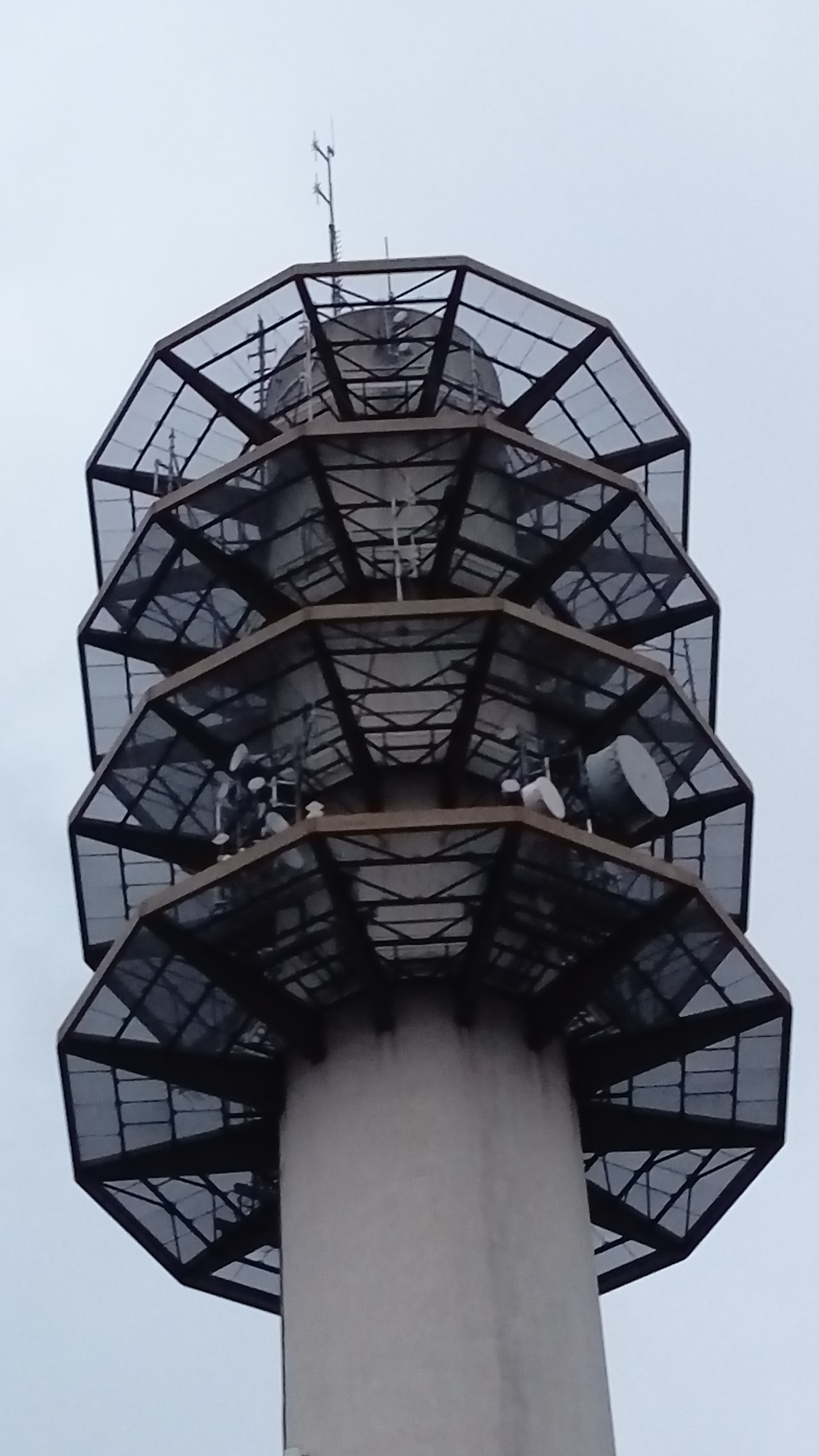 Photo de la Tour